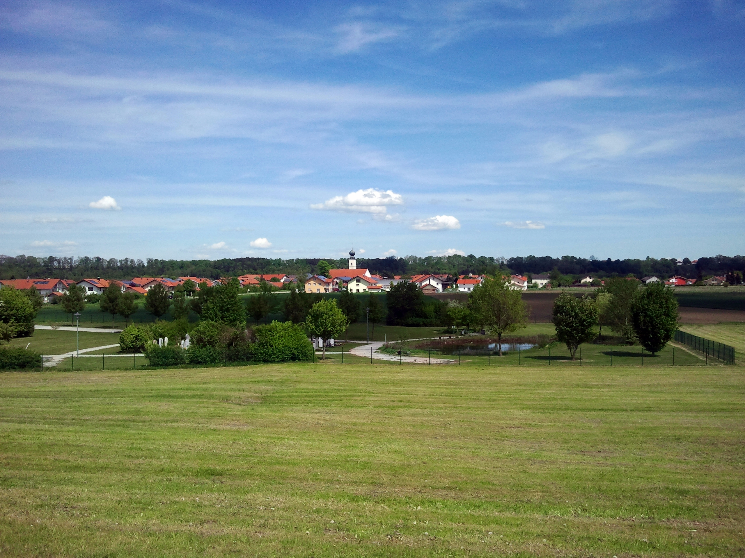 Blick von West nach Ost über den Gemeindefriedhof zum Ortskern von Tacherting